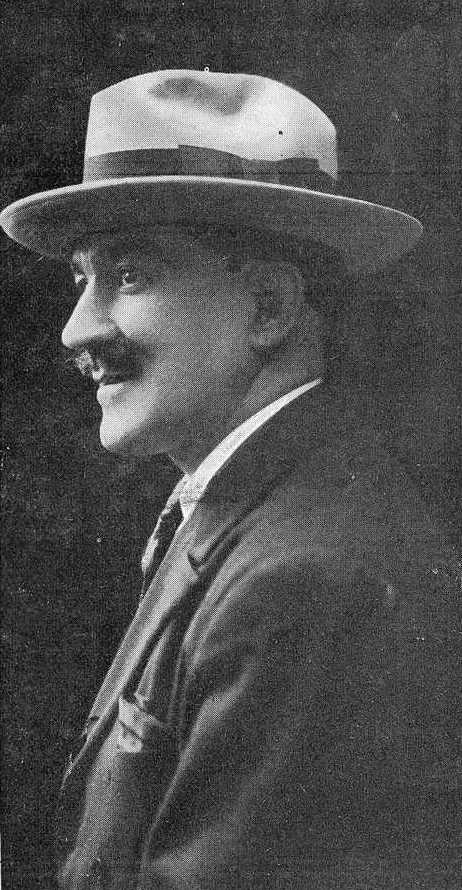 Joaquín de Arévalo, fotografía en Vida Gallega 1928